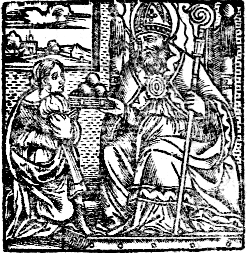 Marca tipografica di Nicolò di Aristotile de' Rossi (o Rusci), detto lo Zoppino